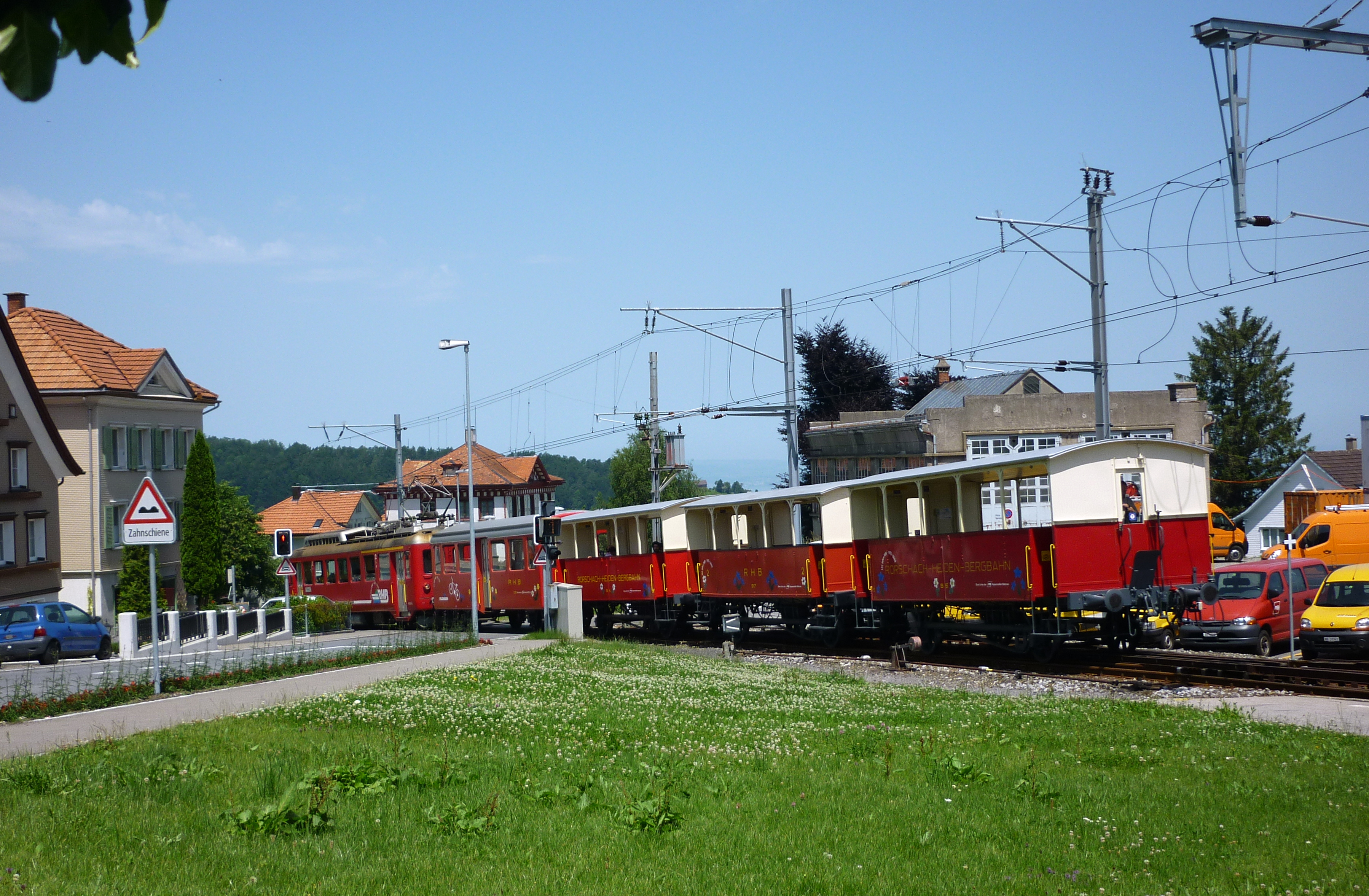 Rorschach-Heiden-Bergbahn (Schweiz) kurz vor dem Endbahnhof Heiden (AR). Triebwagen, Velowagen und drei Sommerwagen.